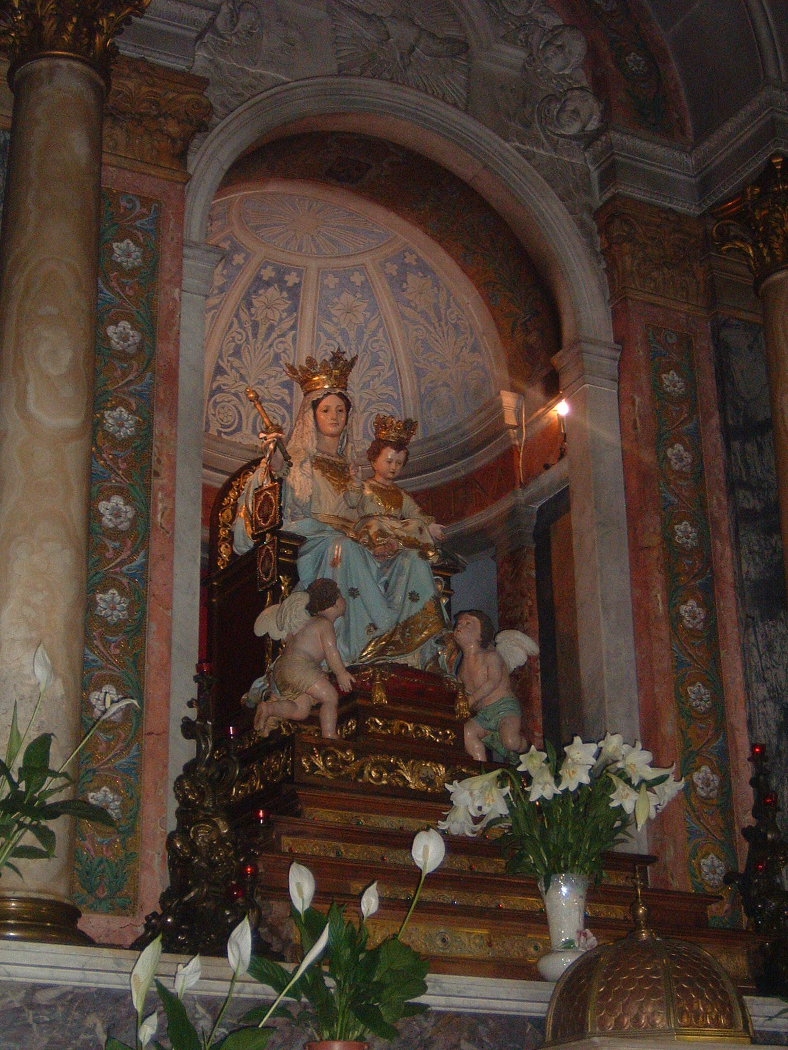 Foto scattata da me il 12 giugno 2008 Statua della Beata Vergine del Monte Carmelo